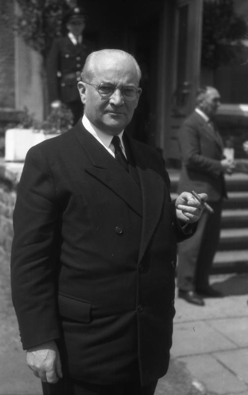 Ministerpräsidenten-Konferenz der Länder der 3 Westzonen Deutschlands auf dem Berghotel Rittersturz in Koblenz (Dr. Carl Spiecker) 8.-10.7.1948